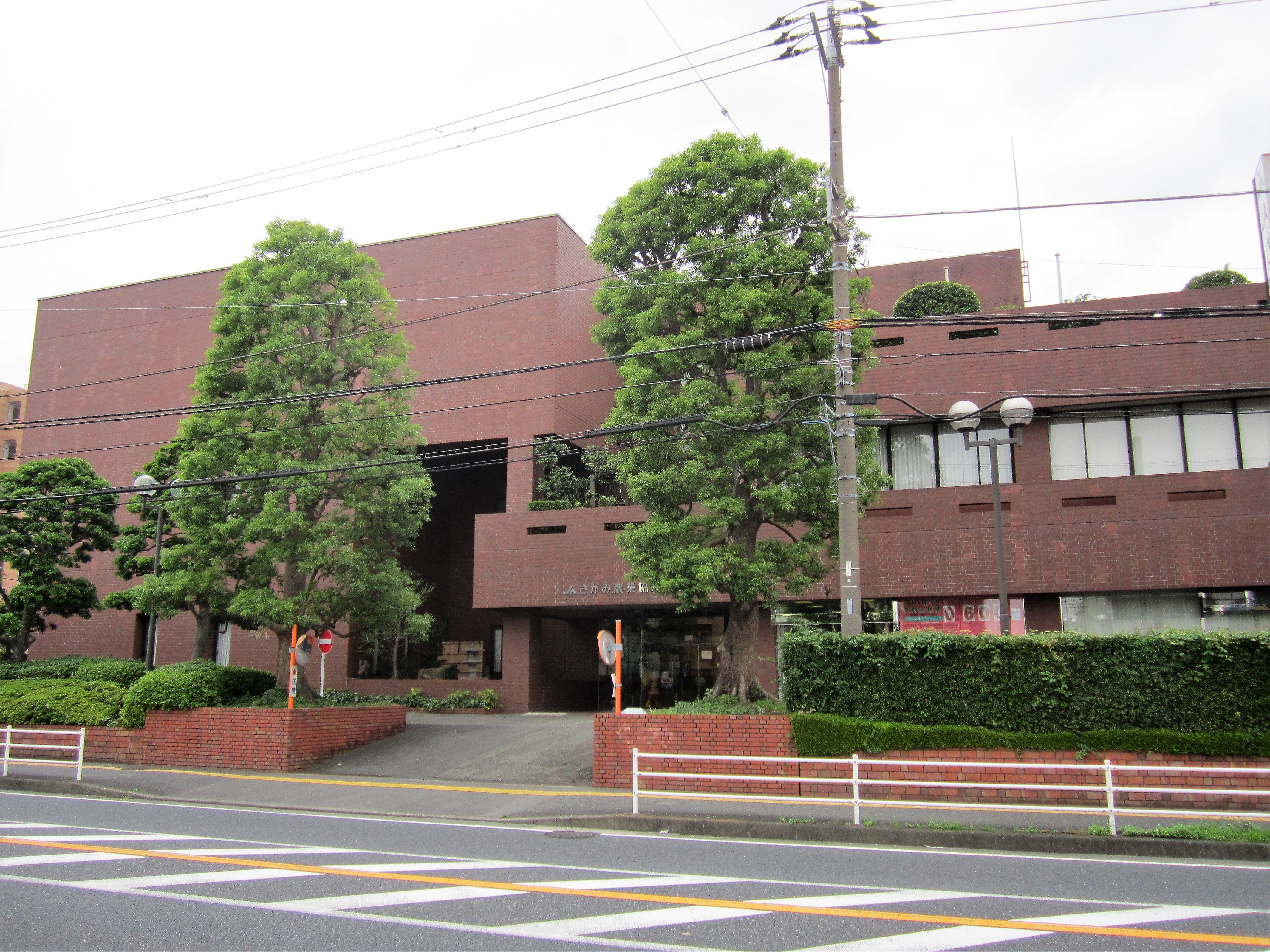 さがみ農業協同組合 本店（藤沢市湘南台）